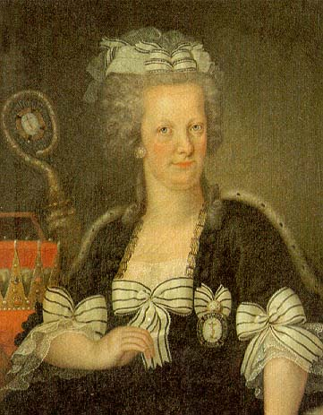 Geb. 1743 in Wien; gest. 1808 in Linz. Sechstes Kind von Kaiserin Maria Theresia und Franz I. Stephan; 1781-1806 Äbtissin des Adeligen Damenstifts in Innsbruck. Dargestellt mit Stiftsabzeichen, Erzherzogshut und Krummstab der Äbtissin.